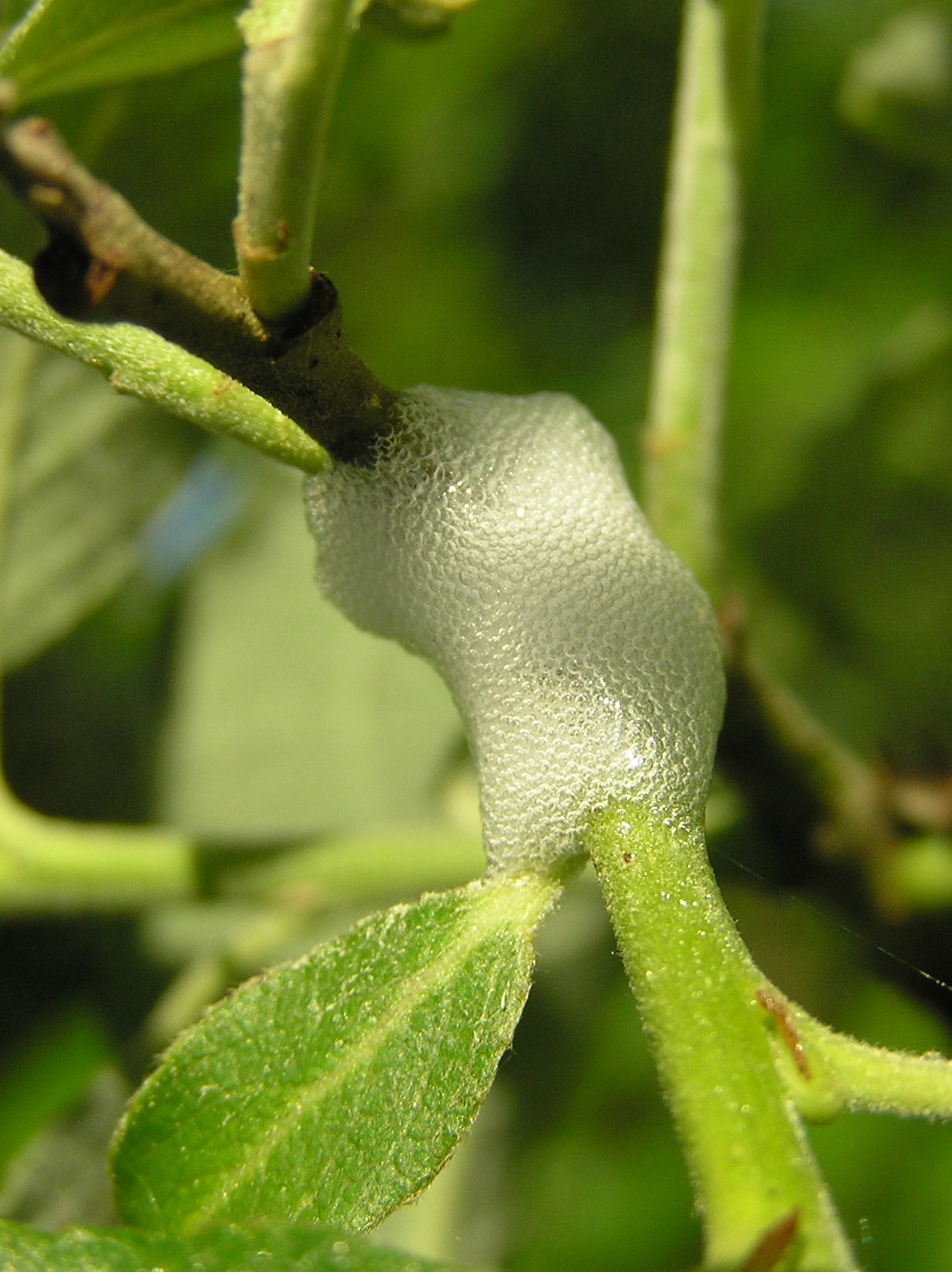 Aphrophora salicis, Pienik wierzbowy, Polska